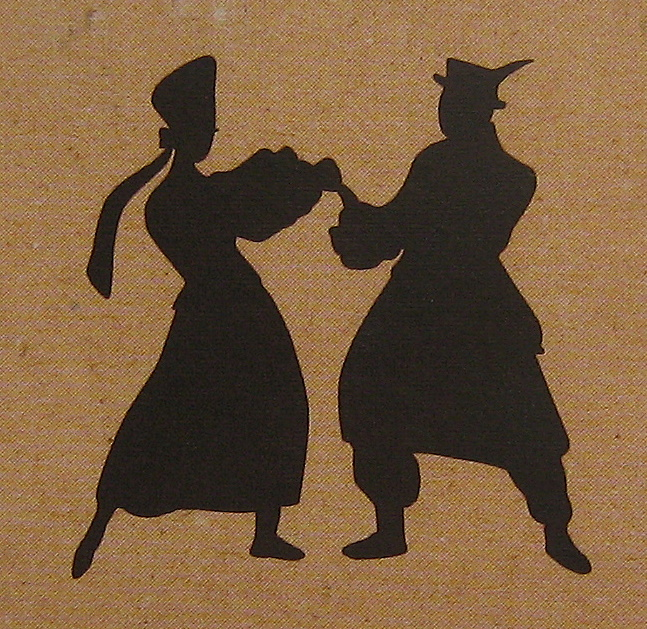 Kurpiowska para - symbol piwa Łomża. Tu z odmian niepasteryzowanych piwa jako kontur sylwetek